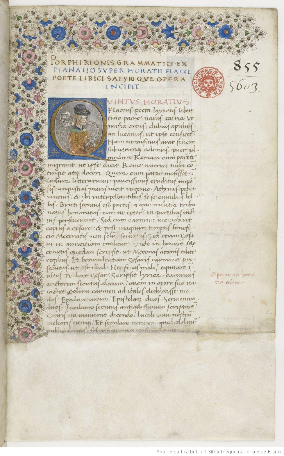 Pomponius Porphyrio , Commentarii in Horatii Flacci carmina Auteur : Porphyrio, Pomponius (02..-02..) Date d'édition : 1451-1500. Manuscrit en latin. Décoration italienne. Au f. 1, simple frise à rinceaux de fleurs ornant la marge gauche, avec la lettre Q habitée par un petit personnage portant un phylactère. Le texte comporte plusieurs petites initiales en or sur un fond à trois couleurs (rose, vert et bleu). Droits : domaine public. Identifiant : ark:/12148/btv1b8447102h. Source : Bibliothèque nationale de France.